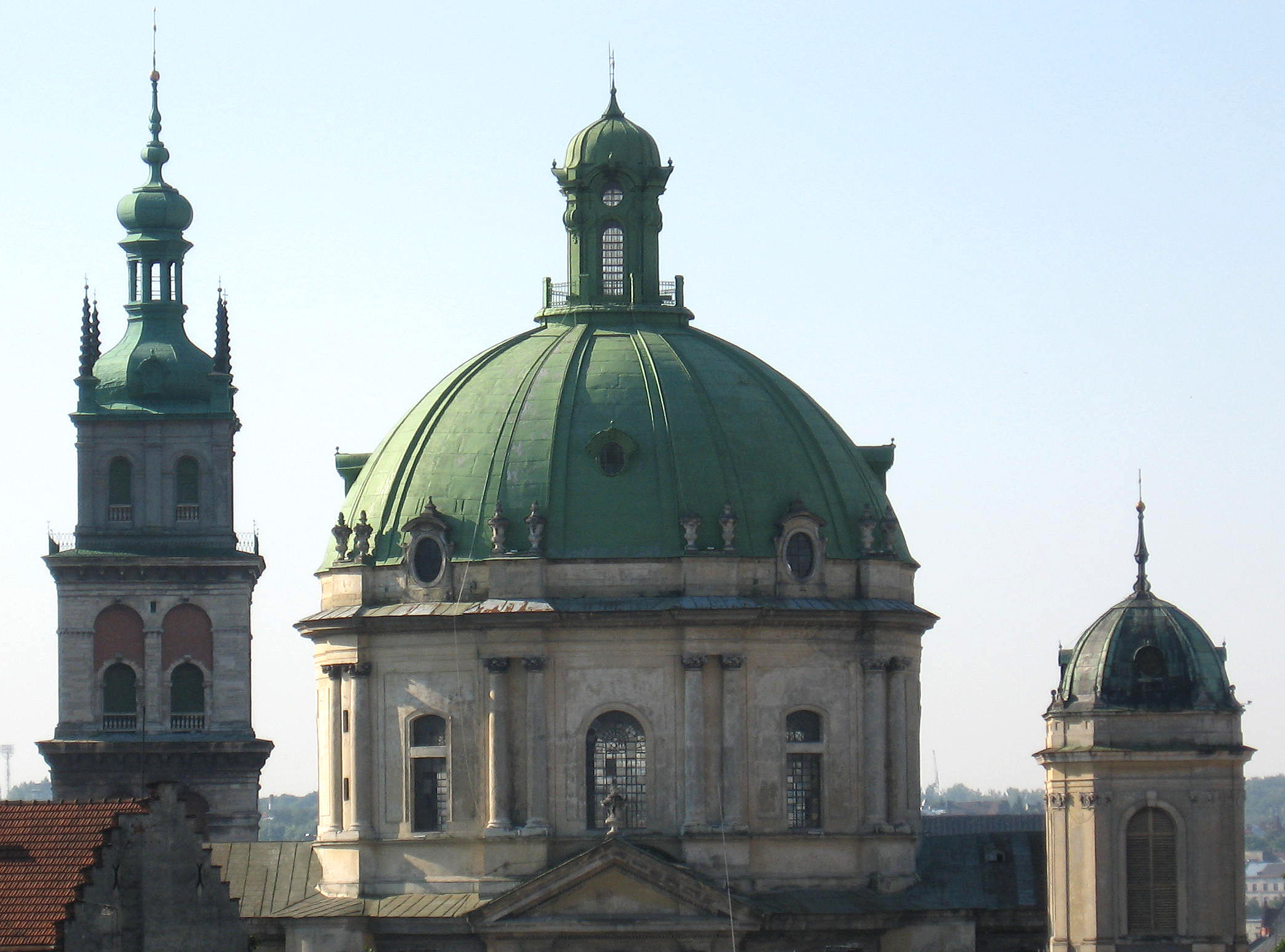 Башня Корнякта и Доминиканский собор во Львове